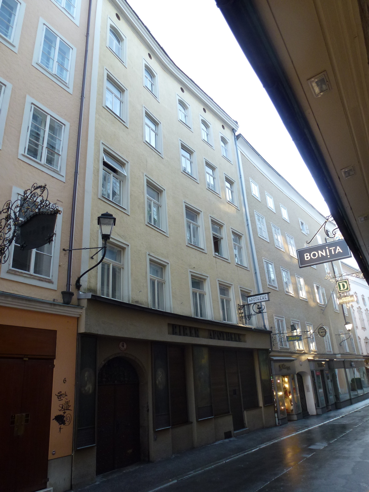 Bürgerhaus, Apotheke, Zum Goldenen Biber